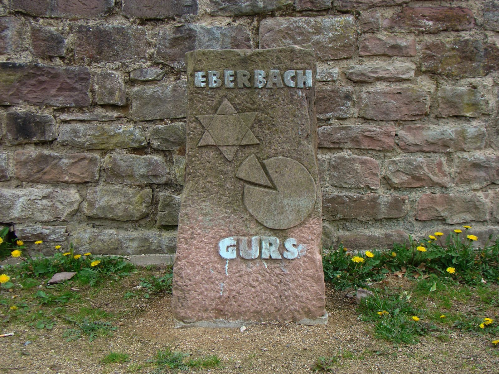 Gedenkstein am Platz der ersten Synagoge in Eberbach. Nutzung als Synagoge: 1860–97, Haus abgerissen 1986